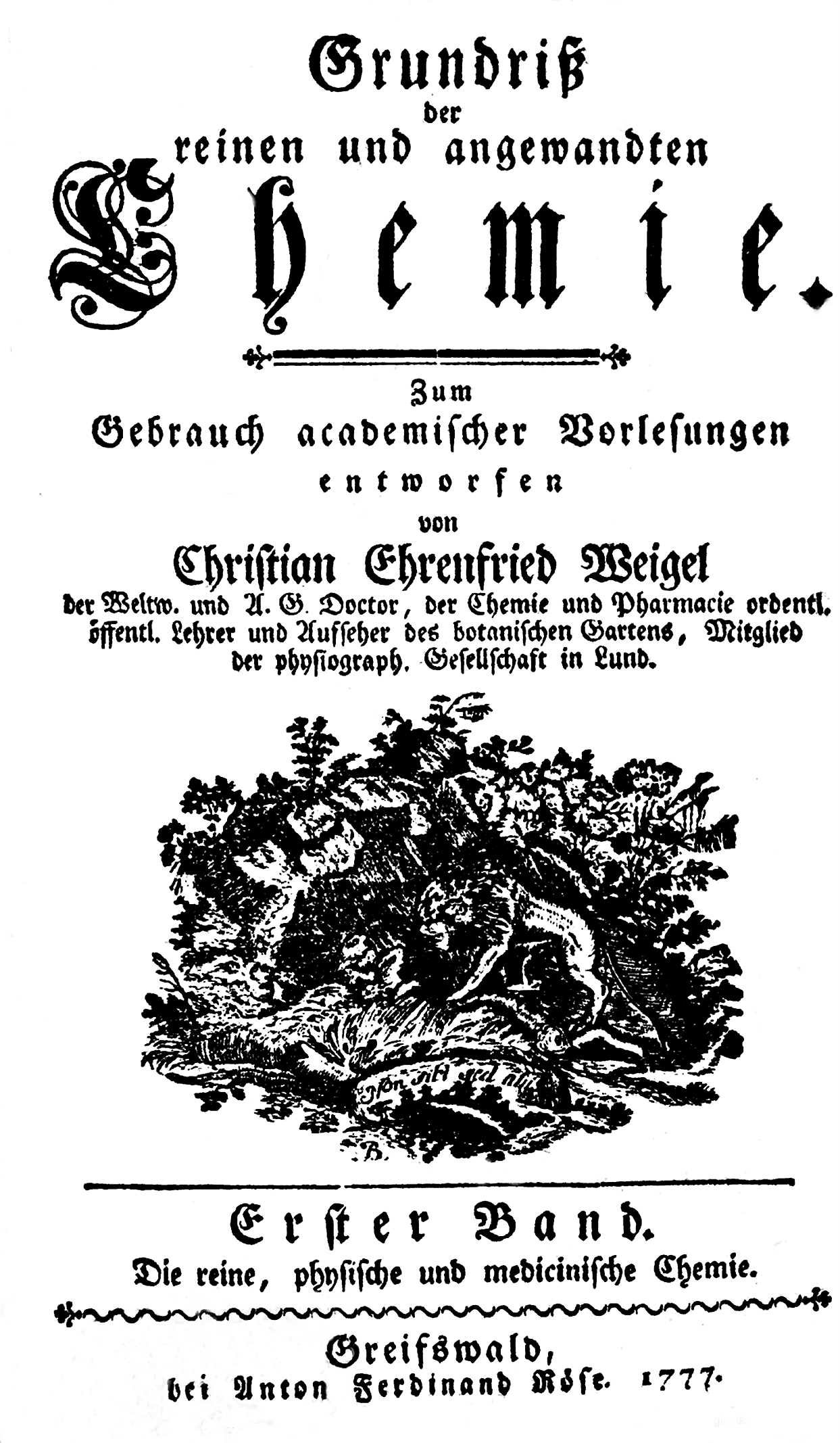 Christian Ehrenfried Weigel: "Grundriss der Chemie", Bd.1, 1777